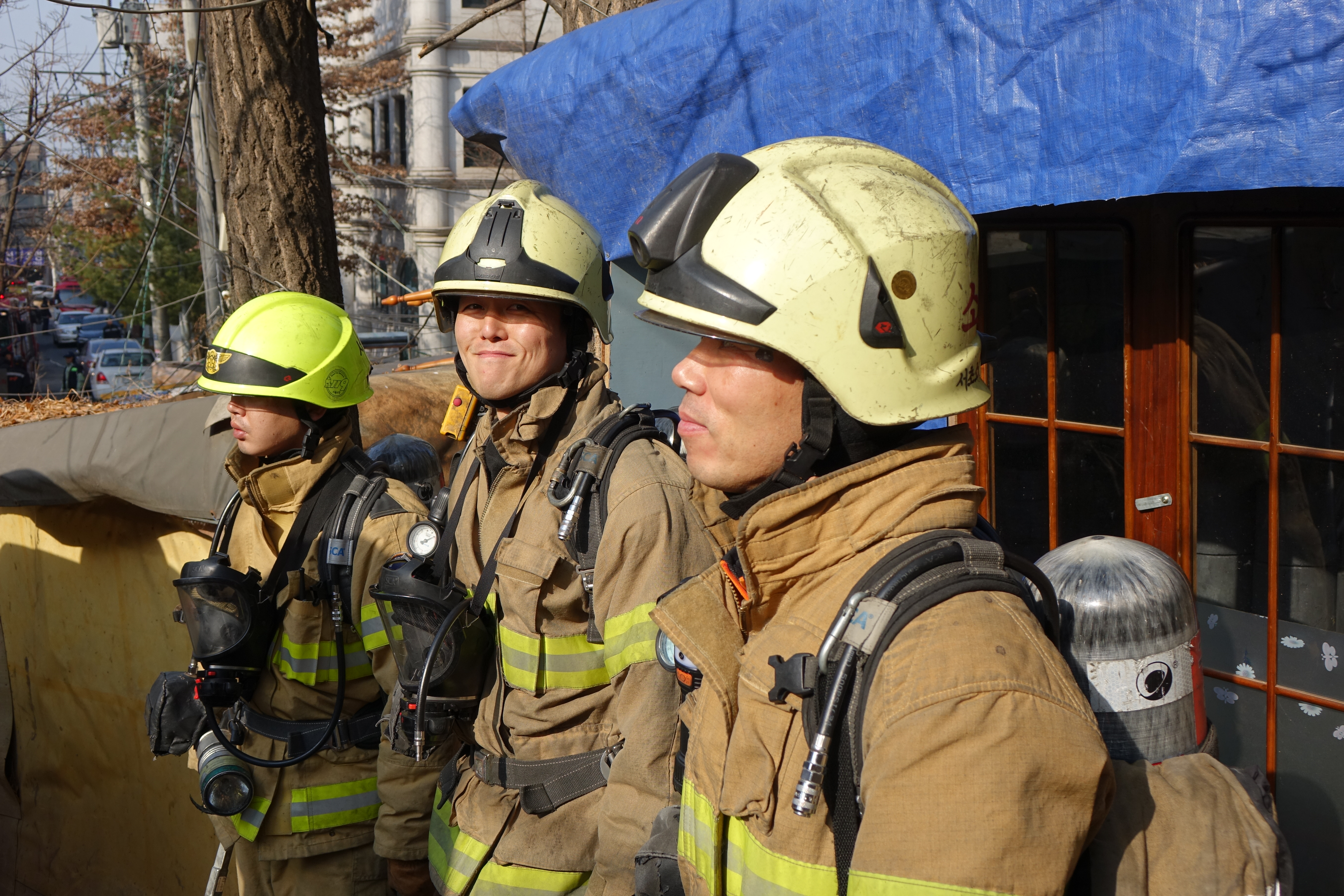 서초소방서 구조대원 김하름 등이 서초구 판자촌 응봉마을에서 소방훈련을 하고 있다.